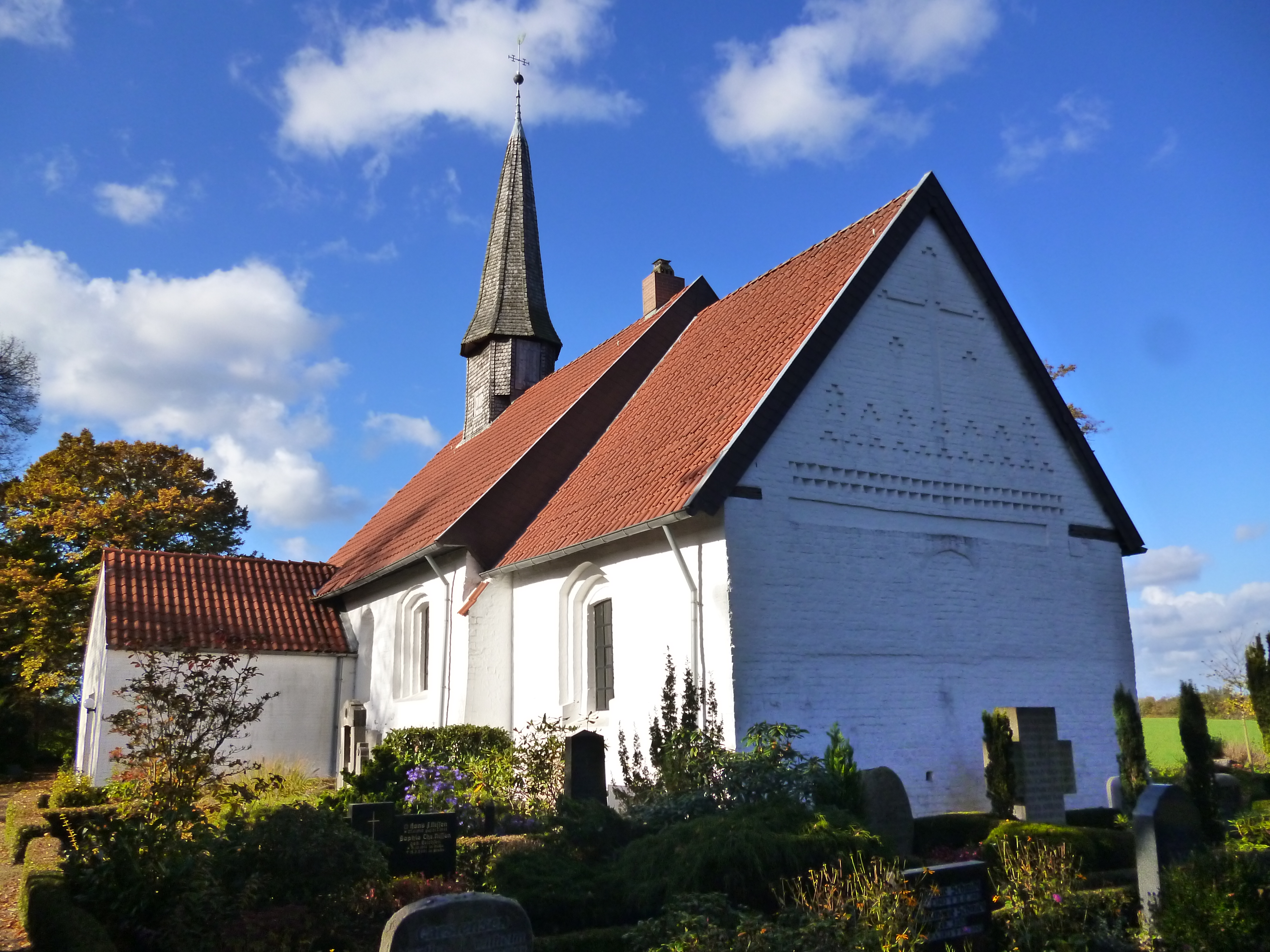 Jakobus-Kirche in Uesby, Süd- und Ostseite